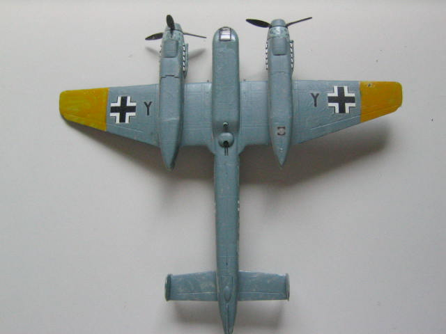 Das Bild zeigt ein von mir gebautes und photographiertes Modell der Arado Ar 240 von unten.